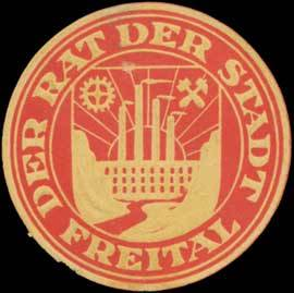 Sealing stamp Title: Der Rat der Stadt Freital Description: gelb, rot, geprägt Place: Freital size: 4 cm